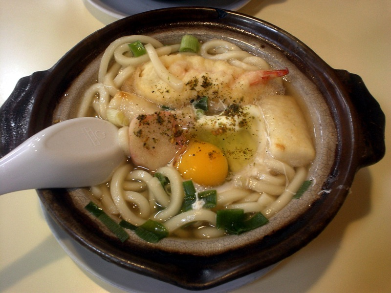 Nabeyaki udon in Kyoto style